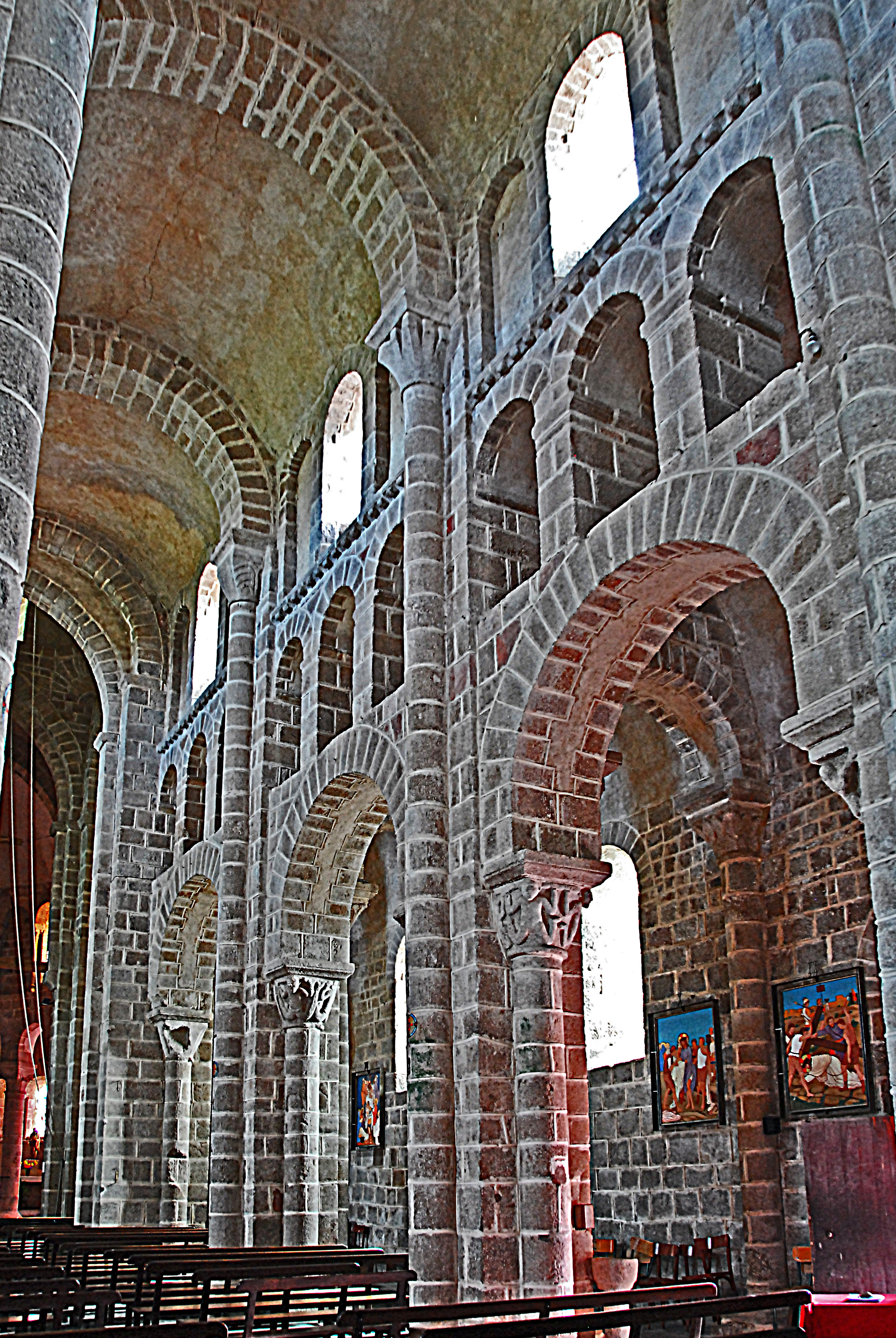 N.-D. de Châtel-Montagne, Mittelschiff, Südwand Joche 2-4